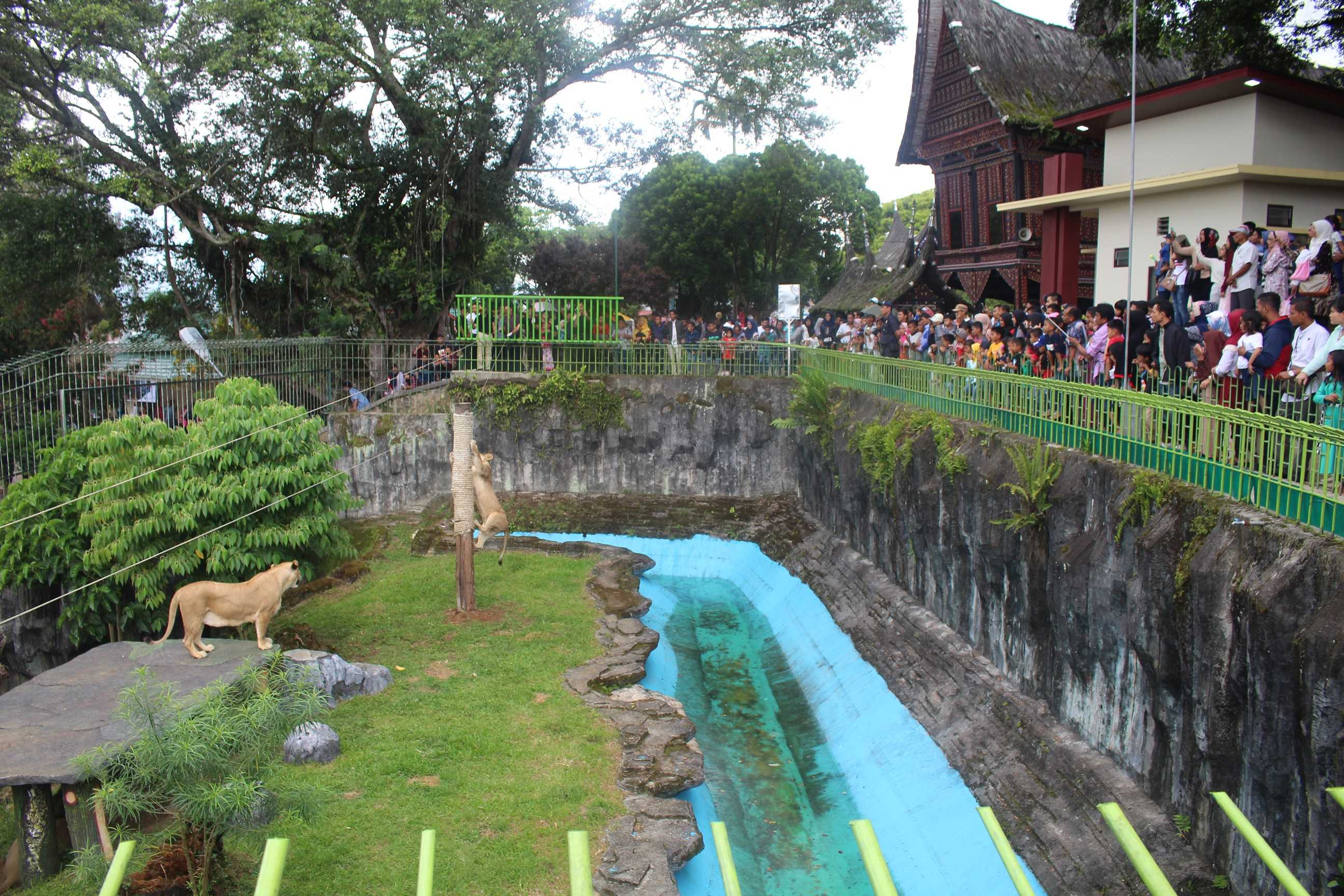 Kebun Binatang Bukittinggi Ramai